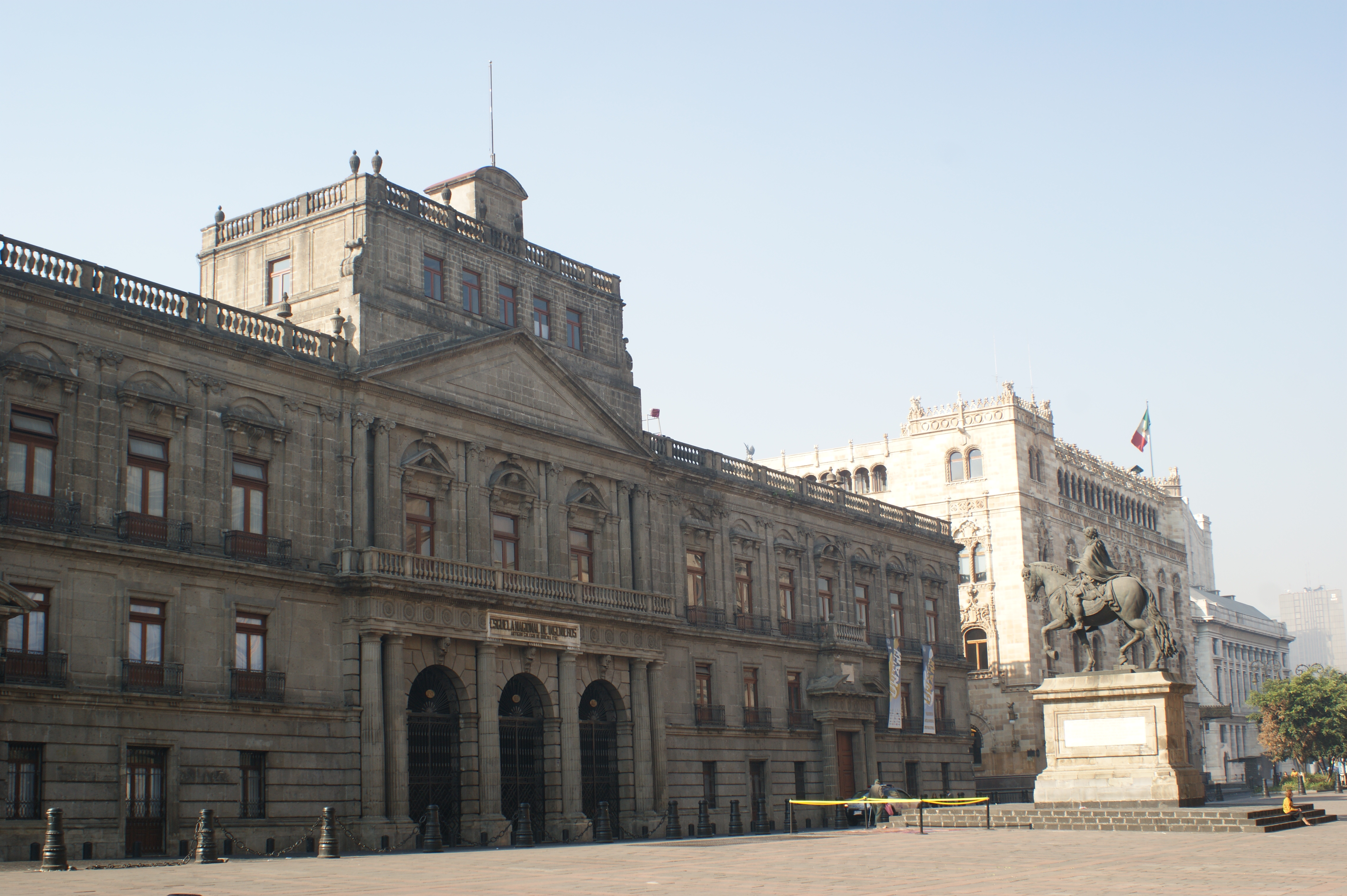 Antigua escuela nacional de ingenieros Cd. de México